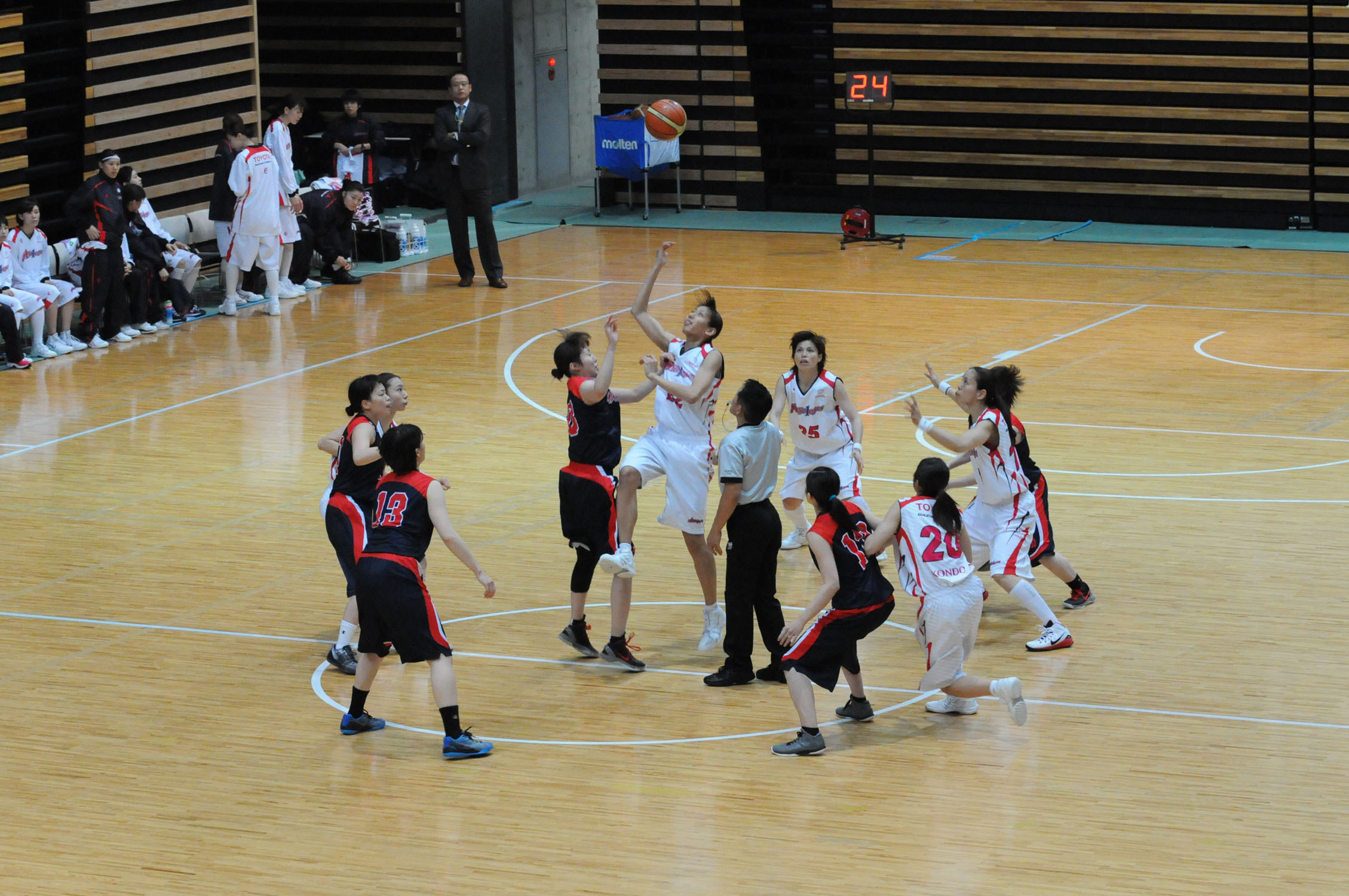 2015年全日本総合バスケットボール選手権大会3回戦、トヨタ自動車アンテロープス対秋田銀行。大田区総合体育館で。